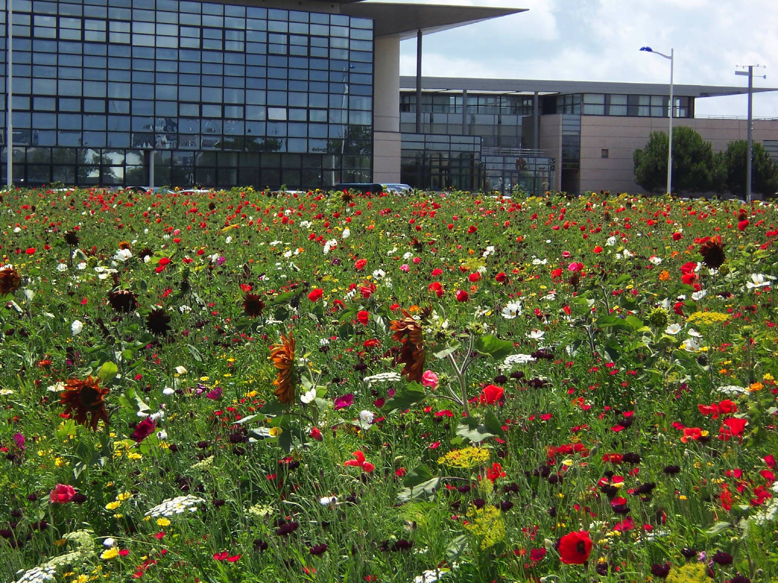 Photo du champ de fleurs devant l'université de La Rochelle (Faculté de Sciences)